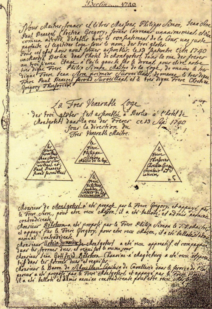 Protokollbuch